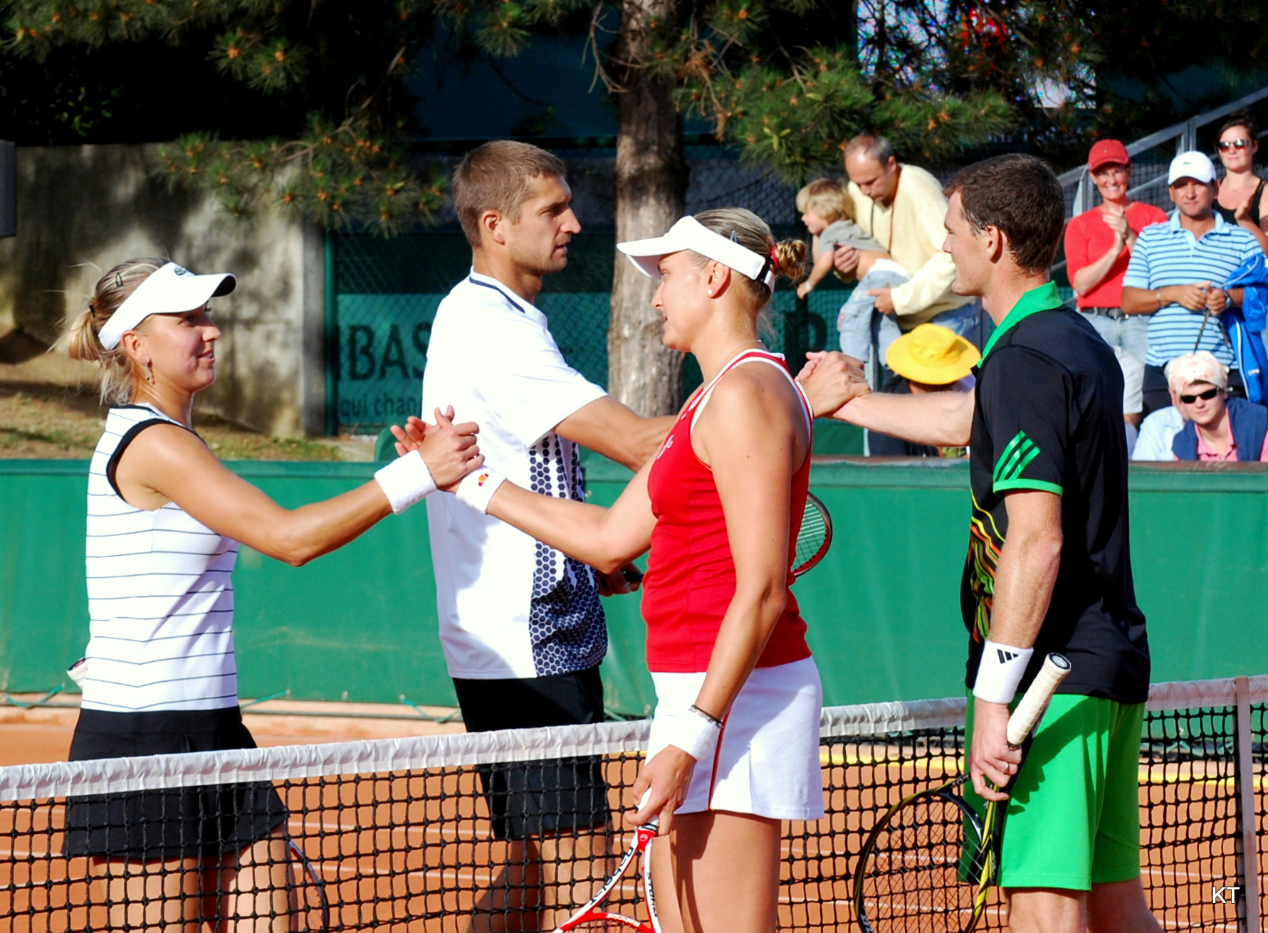 Roland Garros 2011